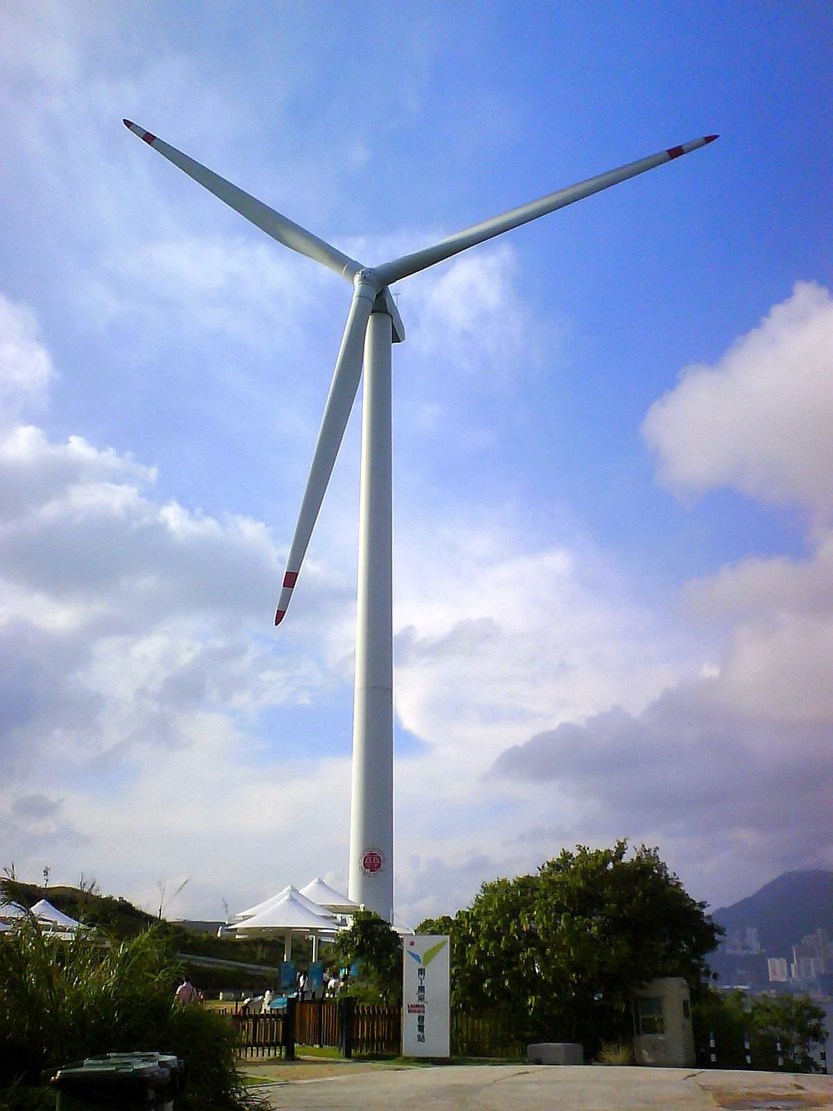 南丫風採發電站